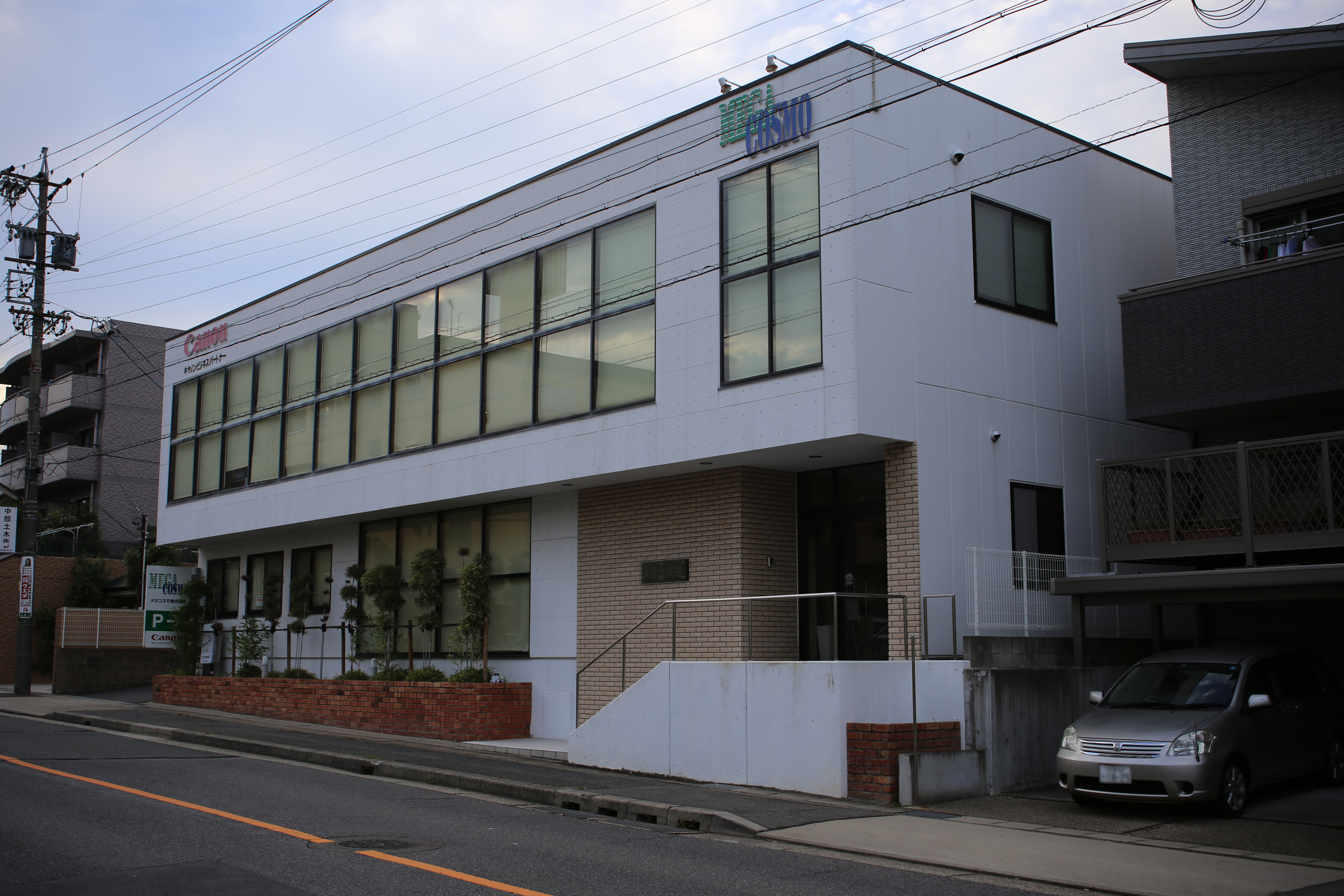 名古屋市名東区社台のメガコスモ本社を南側公道東側より撮影